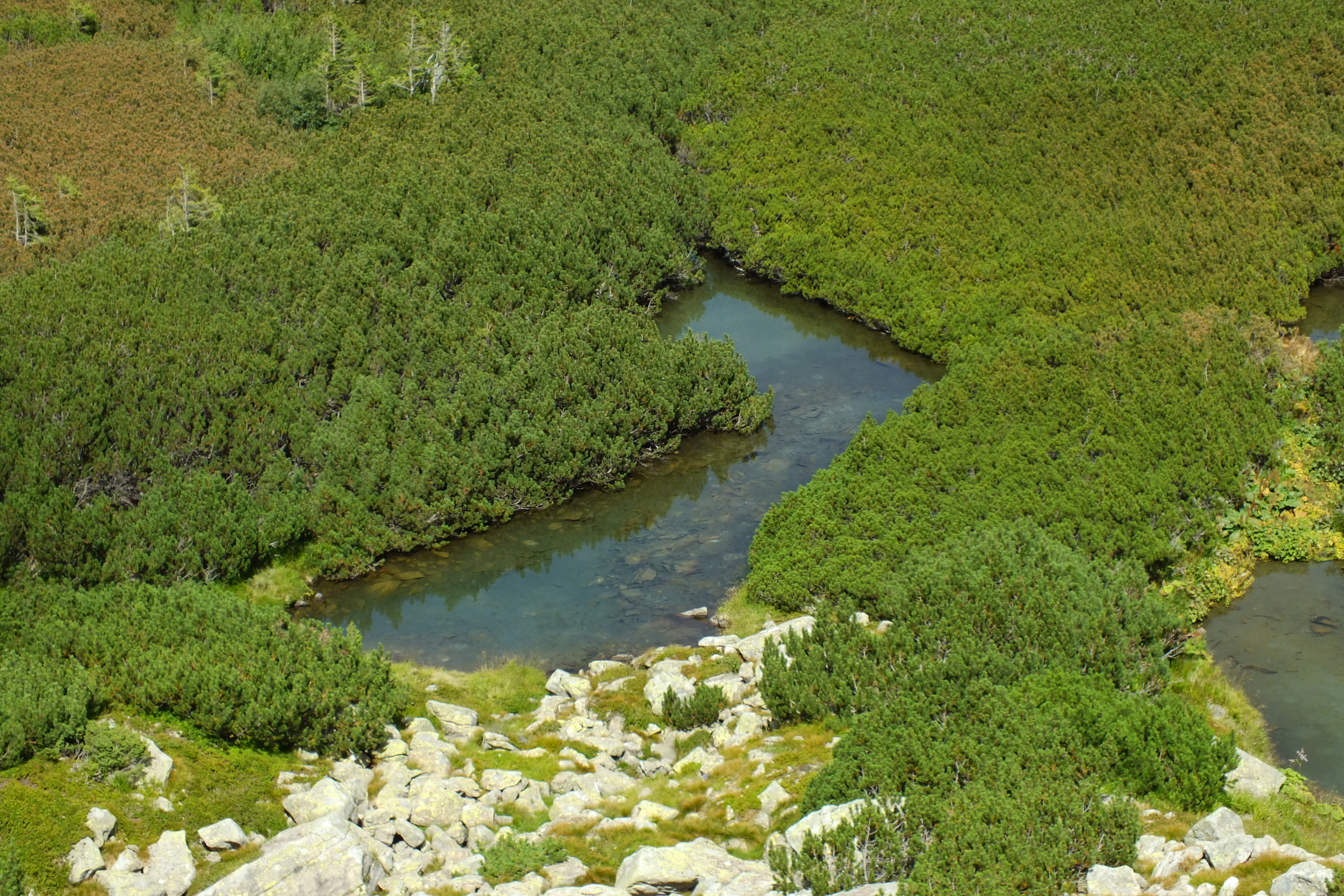 Озерце Жерепове - загальний вигляд зверху.